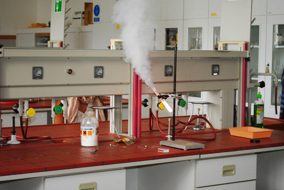 A kőbányai Szent László Gimnázium kémiagyakorlója (Budapest)